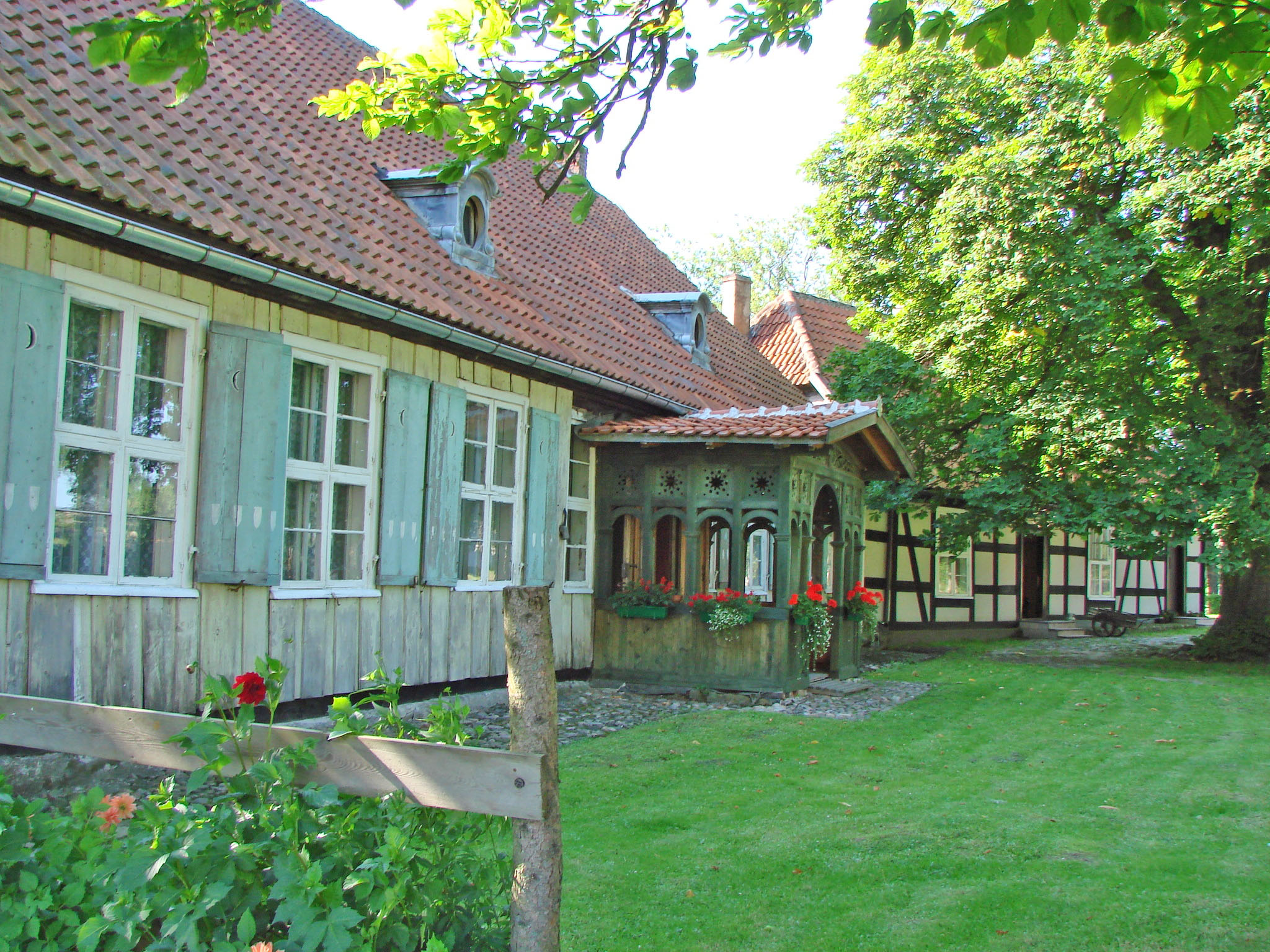 zespół dworski / kaplica p.w. Matki Boskiej Nieustającej Pomocy - d.kaplica dworska oraz dwór/ Mirachowo, Mirachowo